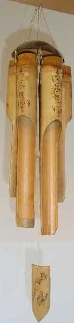 Ein Windspiel als Mitbringsel aus Indonesien aus Bambus. Es ist ein naher Verwandter des Musikinstruments Angklung.